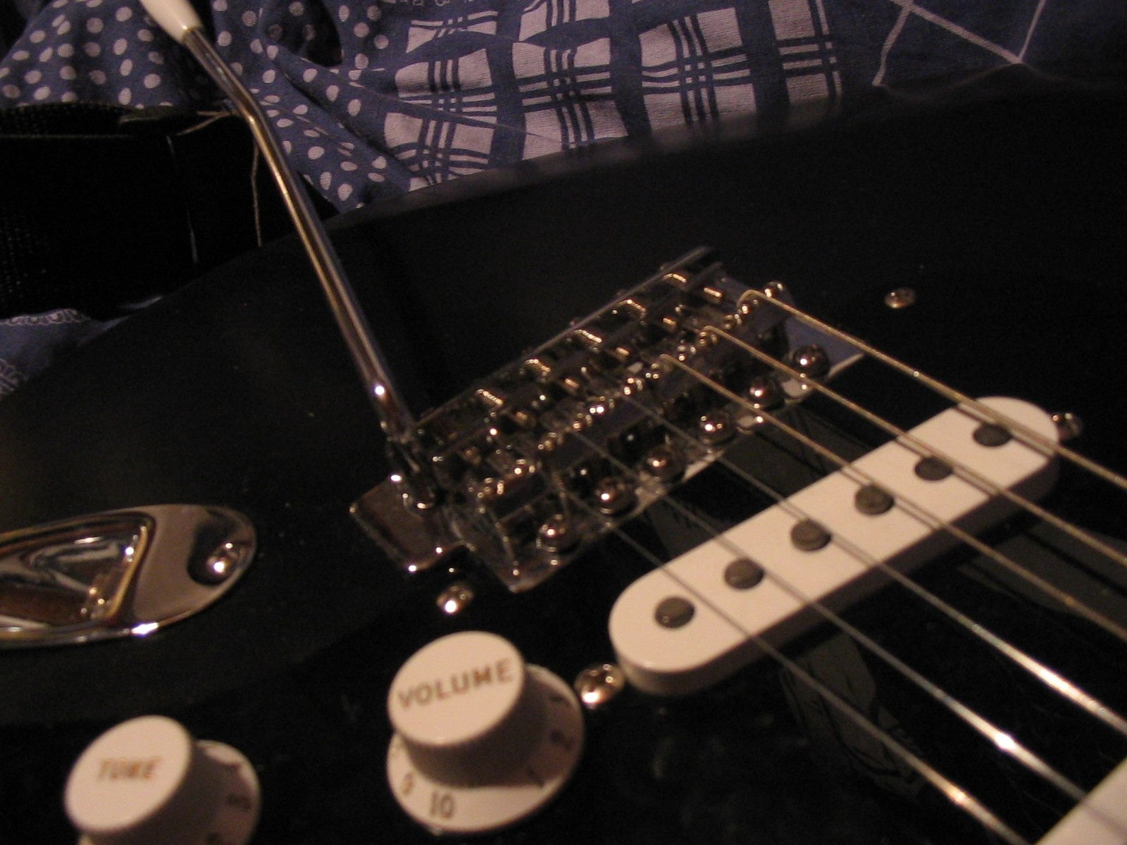 Stratocasterin talla Stratocasterin talla